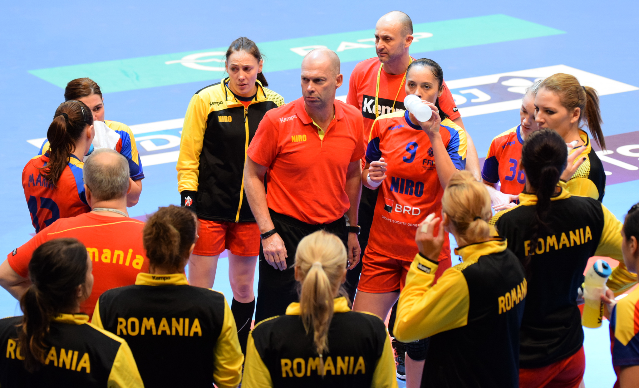 Equipe de Roumanie de handball féminin Le 29 novembre 2015, lors du match Roumanie / Cuba pour le compte du TIPIFF 2015. Au stade Pierre de Coubertin à Paris.